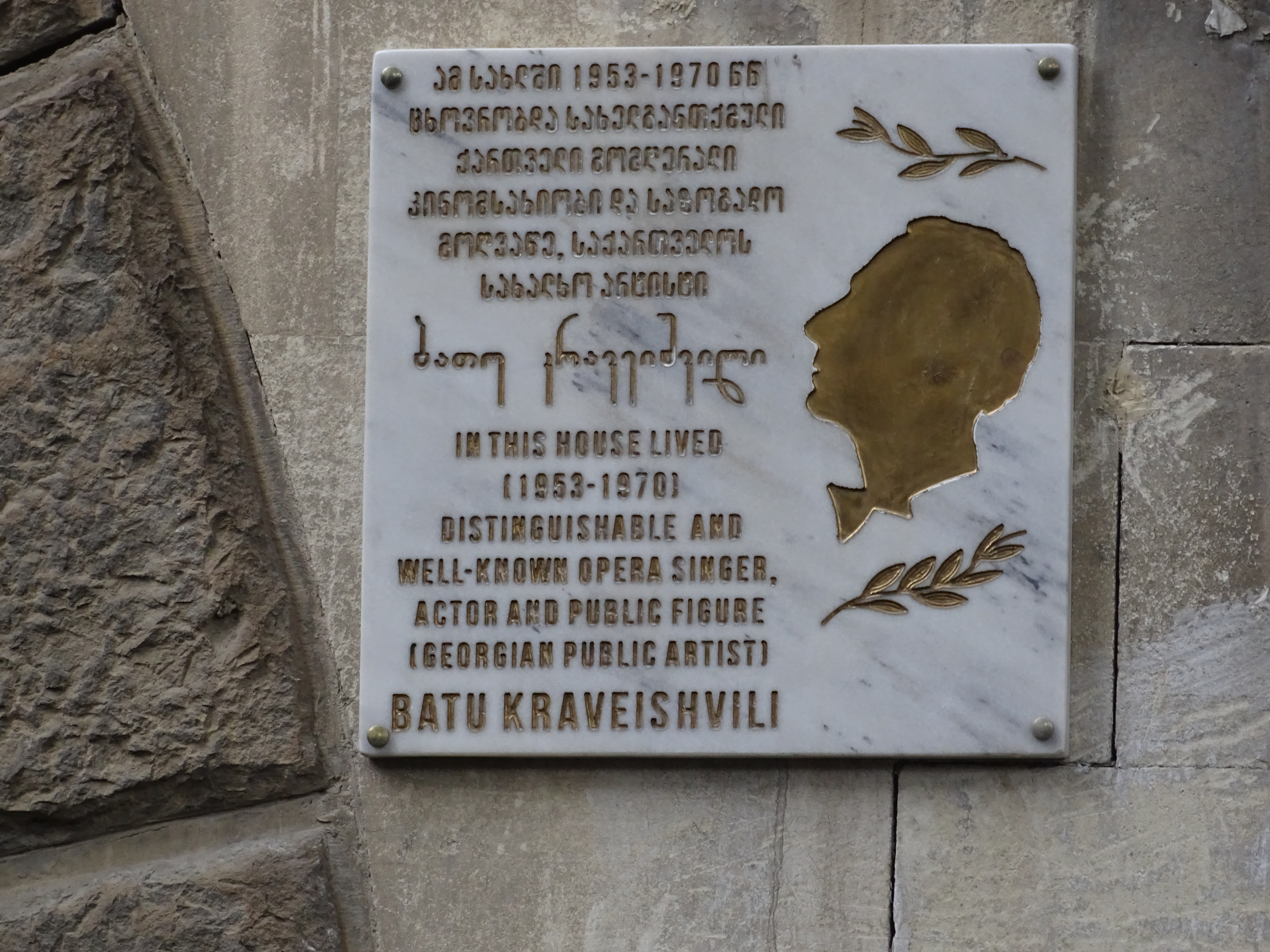 Tafel zu Ehren von Batu Kraveishwili